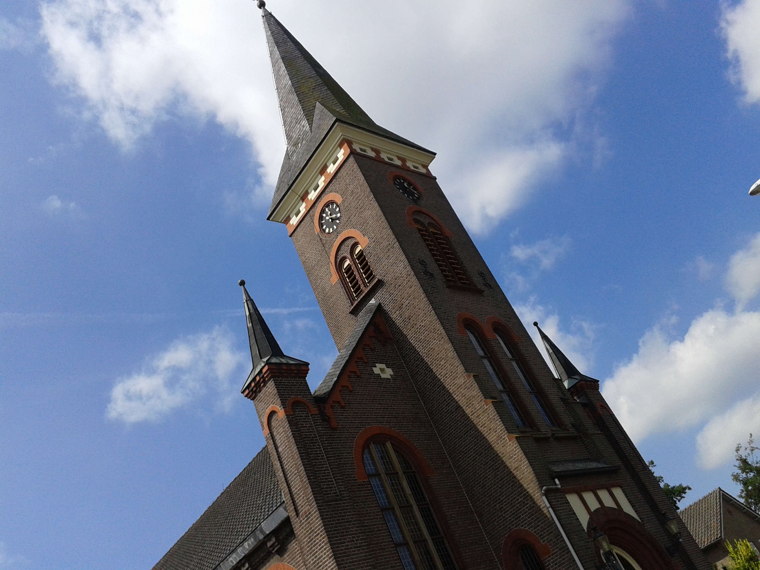 De Hervormde Kerk in Nijkerkerveen uit 1908.